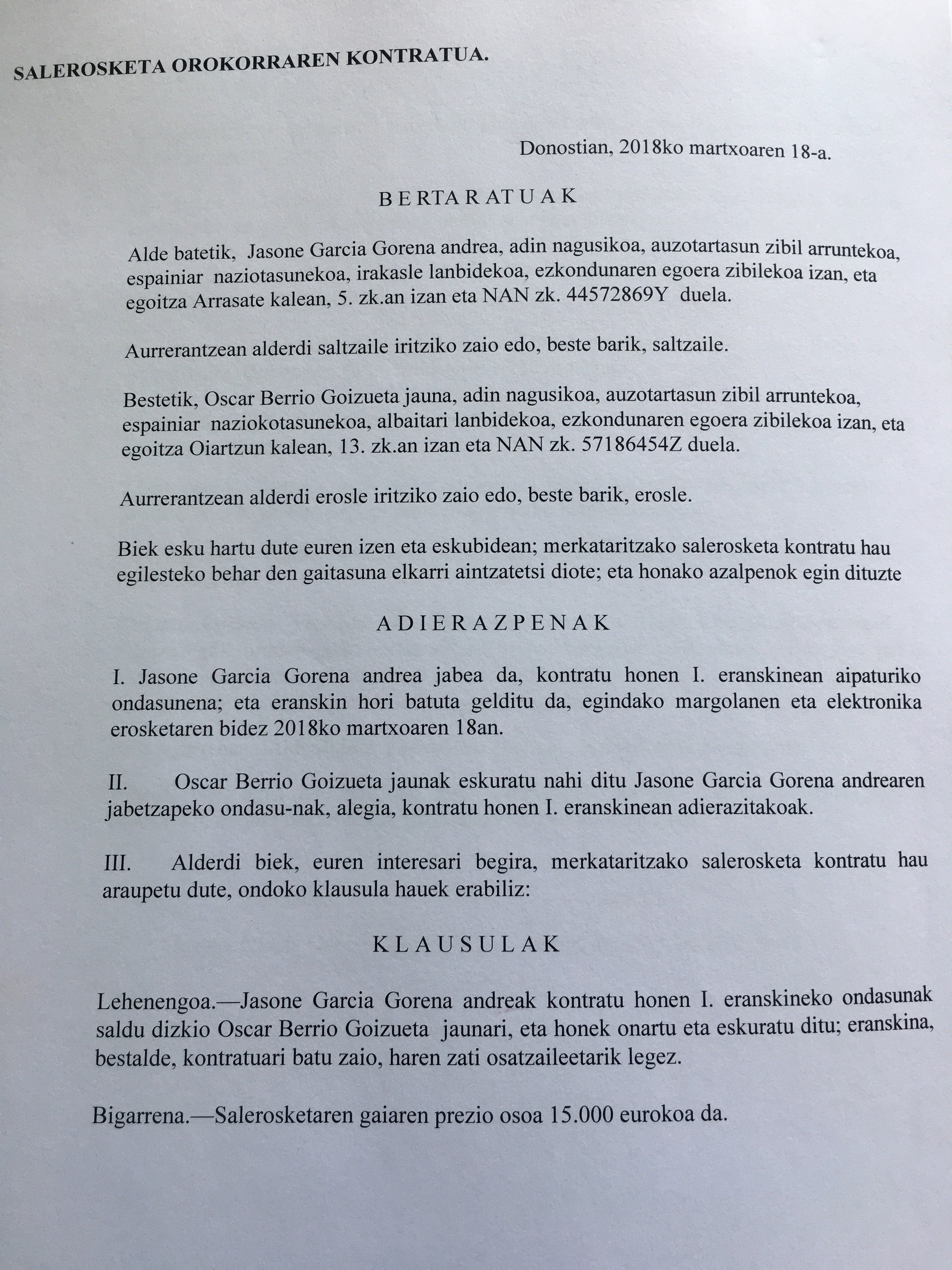 Salerosketa kontratuaren eredua